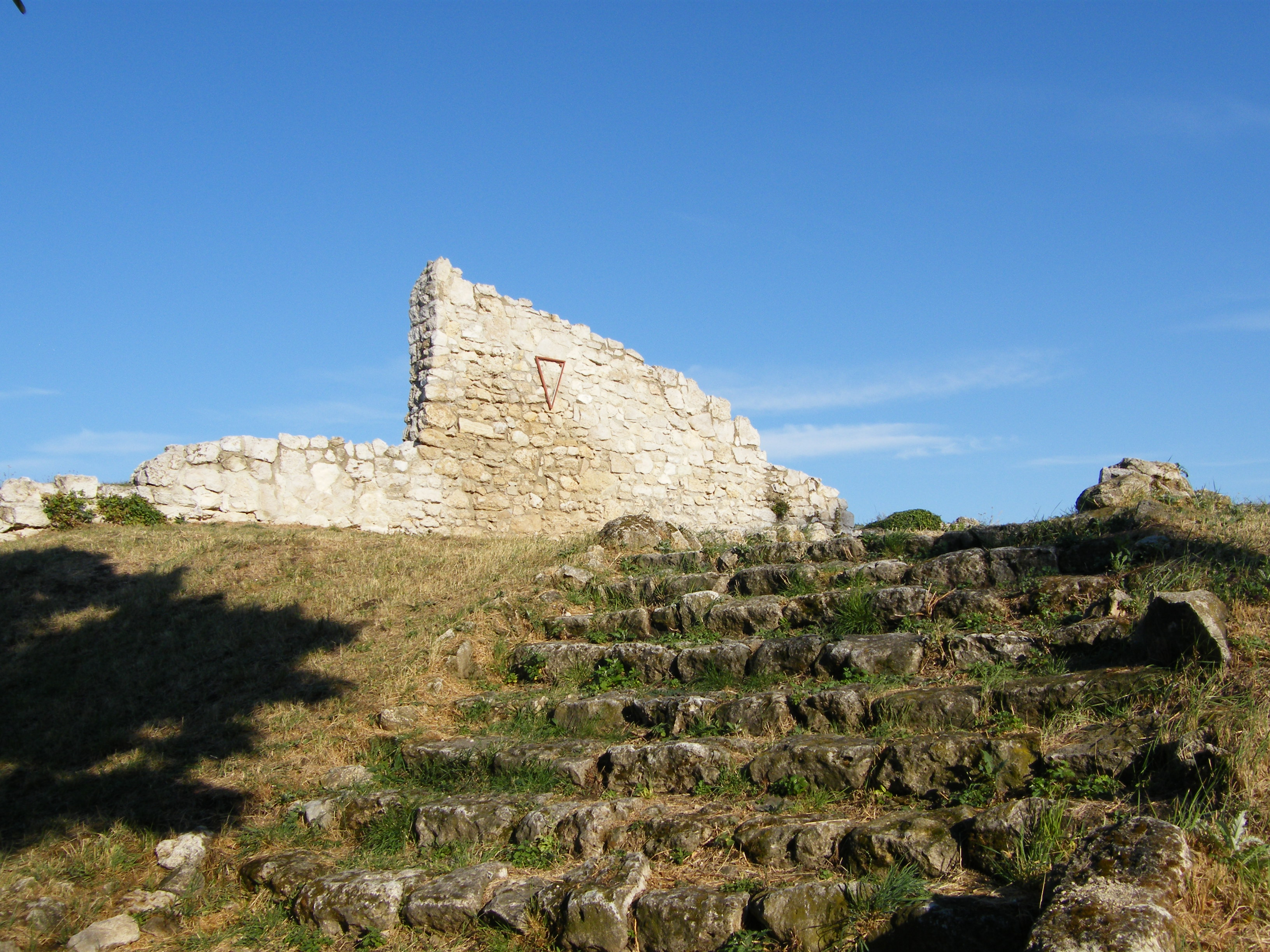 Kutyavár, vadászkastély romjai (Érd, Kutyavári utca 40-42.)